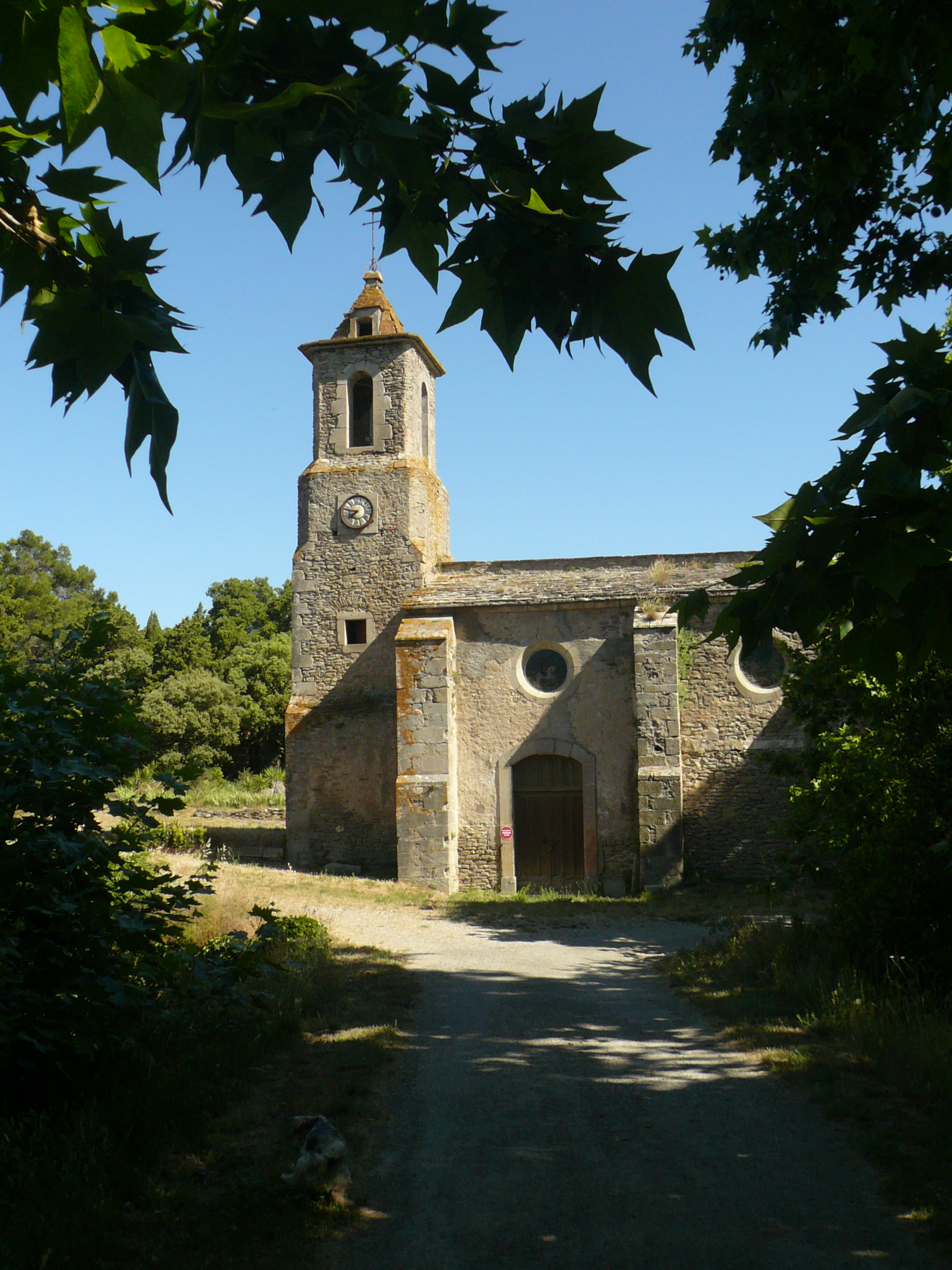 Eglise Saint-Pierre-es-Liens (et non Notre-Dame-de-la-Lauze) à Villarzel-Cabardès (Aude)